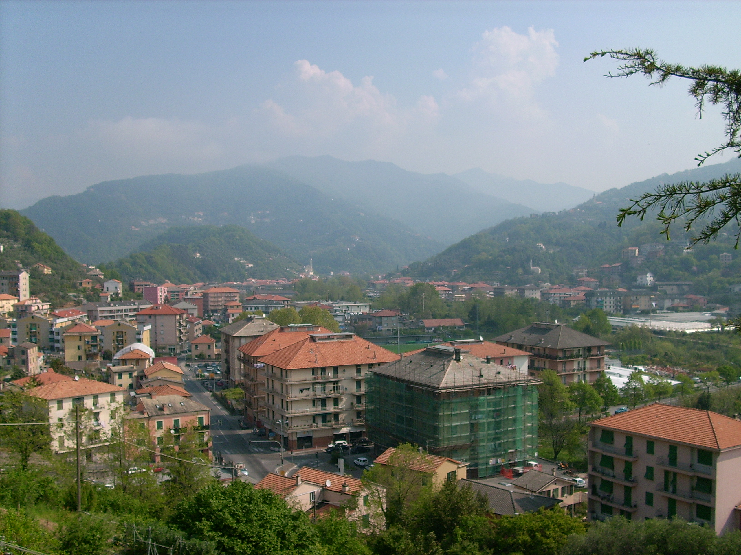 Vista di Caperana (Chiavari), Liguria, Italia